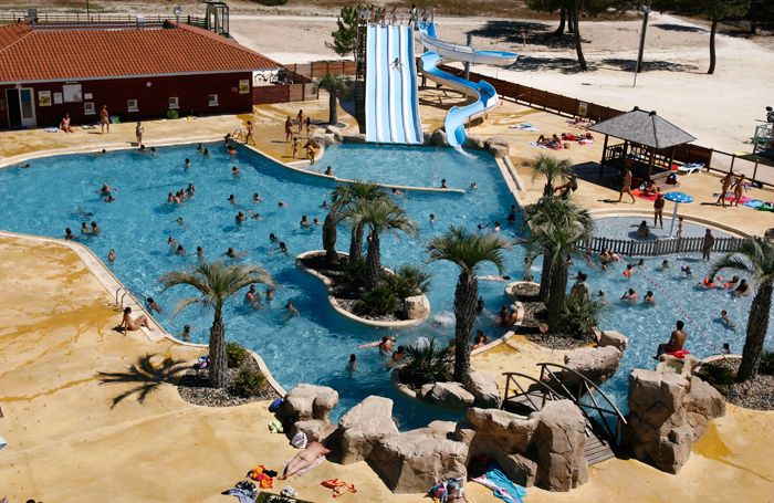 parc aquatique du camping naturiste chm-montalivet en gironde, france